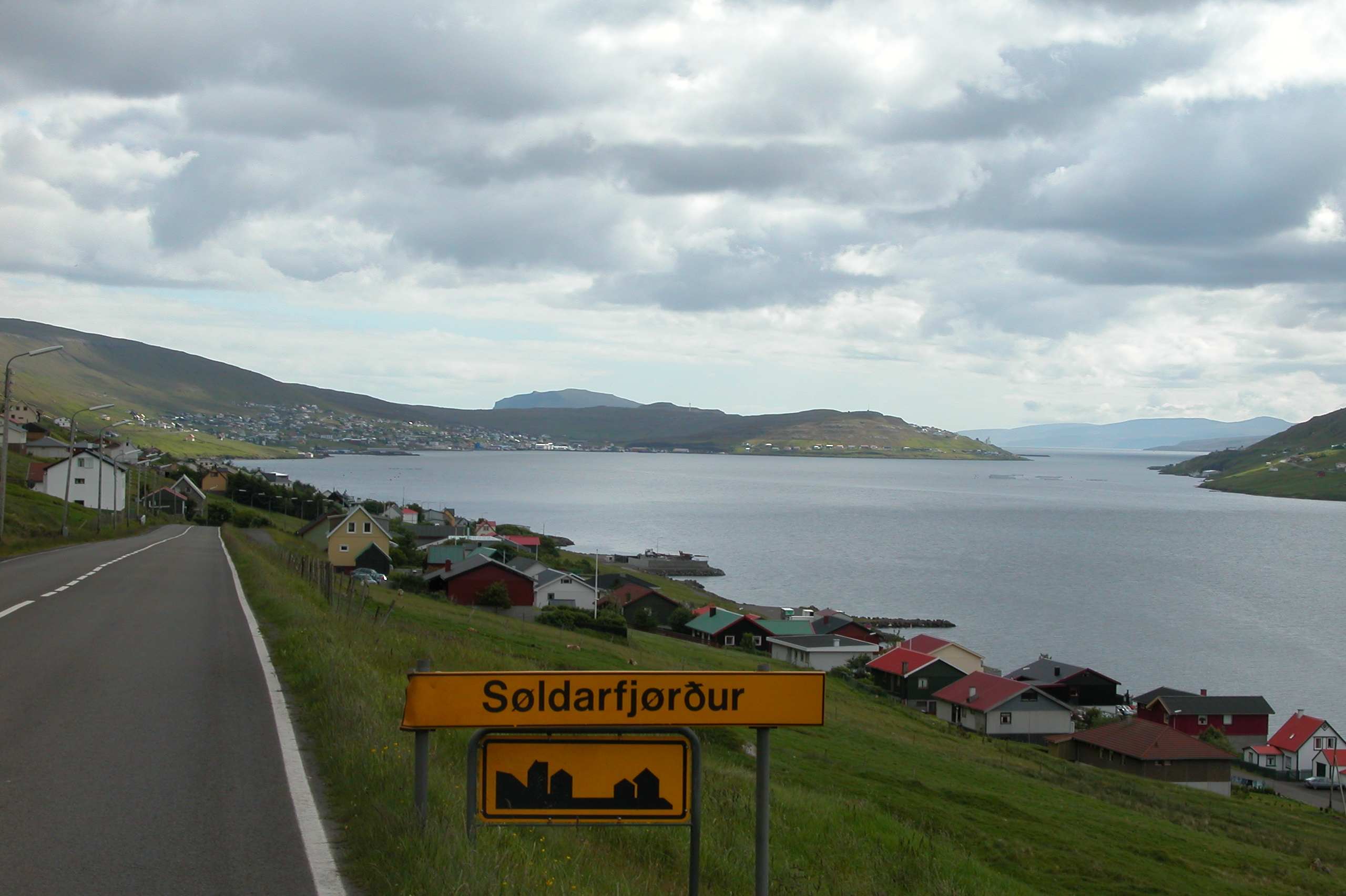 Søldarfjørður at the Skálafjørður in Eysturoy, Faroe Islands